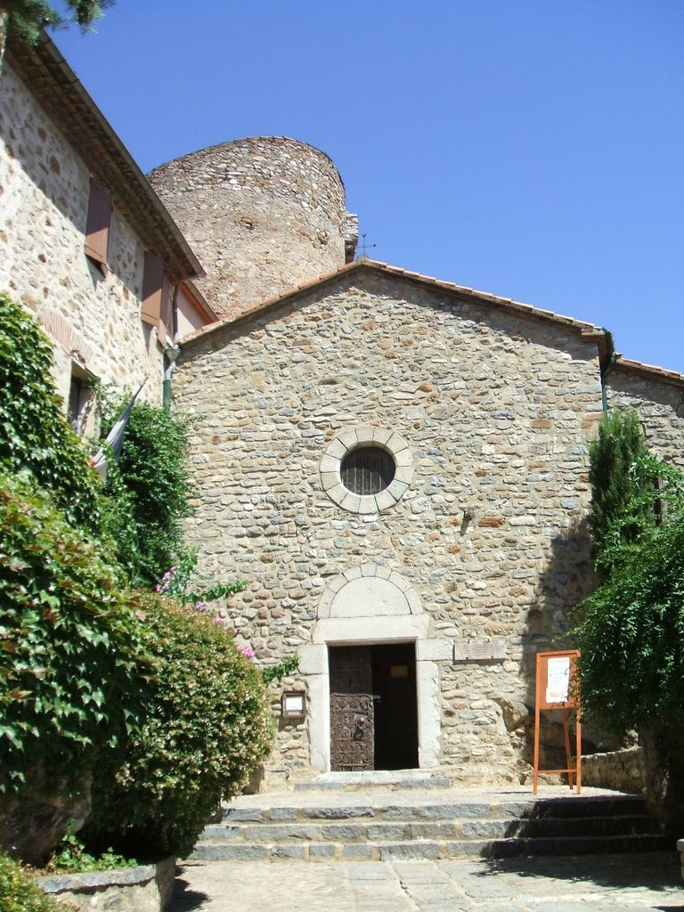 Amélie-les-Bains-Palalda, village médiéval de Palalda (Pyrénées-Orientales, Languedoc-Roussillon, France) : façade de l'église Saint-Martin de Palalda